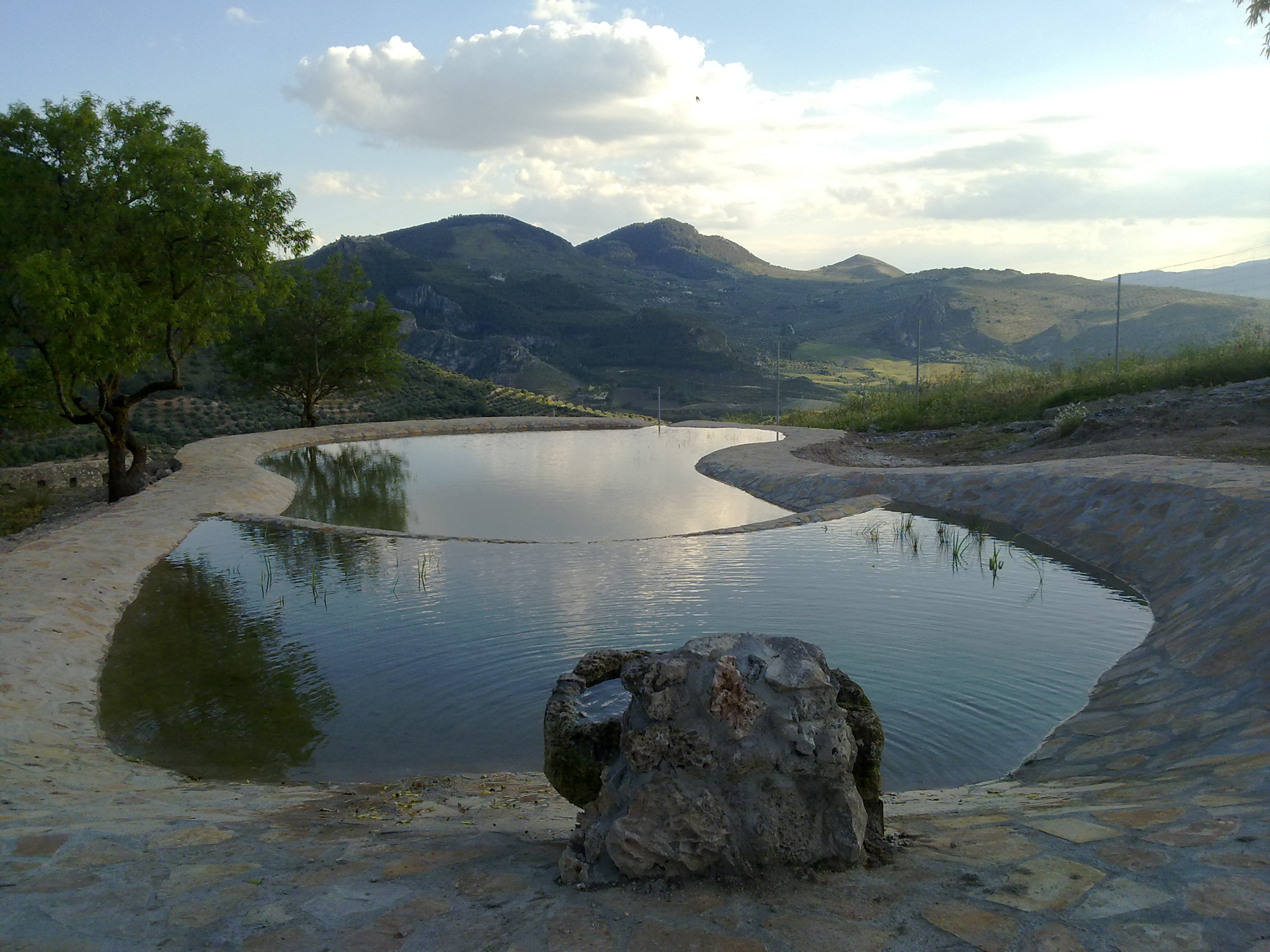 Foto tomada en los parapetos del lago de Tózar, en el municipio de Moclín (Granada, España)